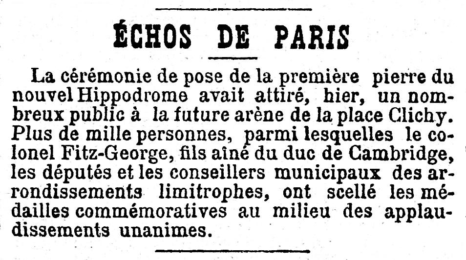 Compte-rendu de la cérémonie de la pose de la première pierre de l'Hippodrome de Montmartre le 16 janvier 1898.